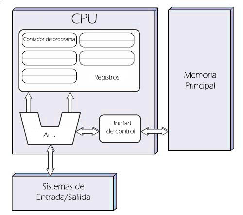 Diagrama de la arquitectura von Neumann